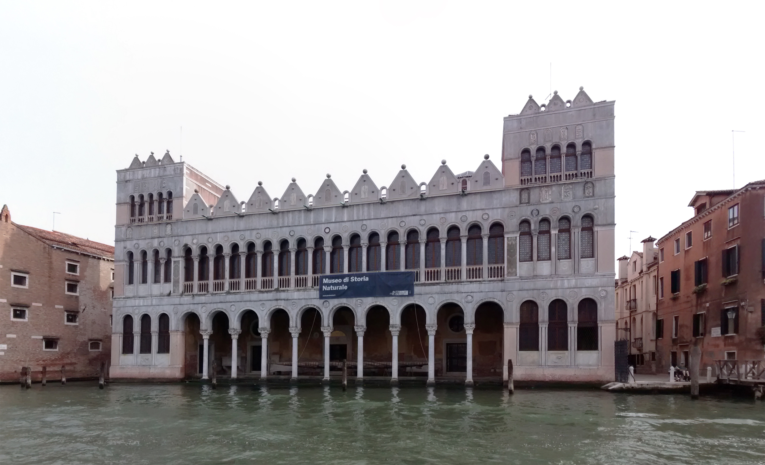 Fontego dei Turchi, Venedig, Städtisches Museum für Naturgeschichte Venedig (Museo civico di storia naturale di Venezia)